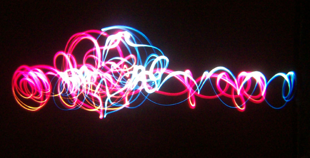 Musique dans le noir, installation vidéo-sonore interactive de Jean-Robert Sedano et Solveig de Ory.